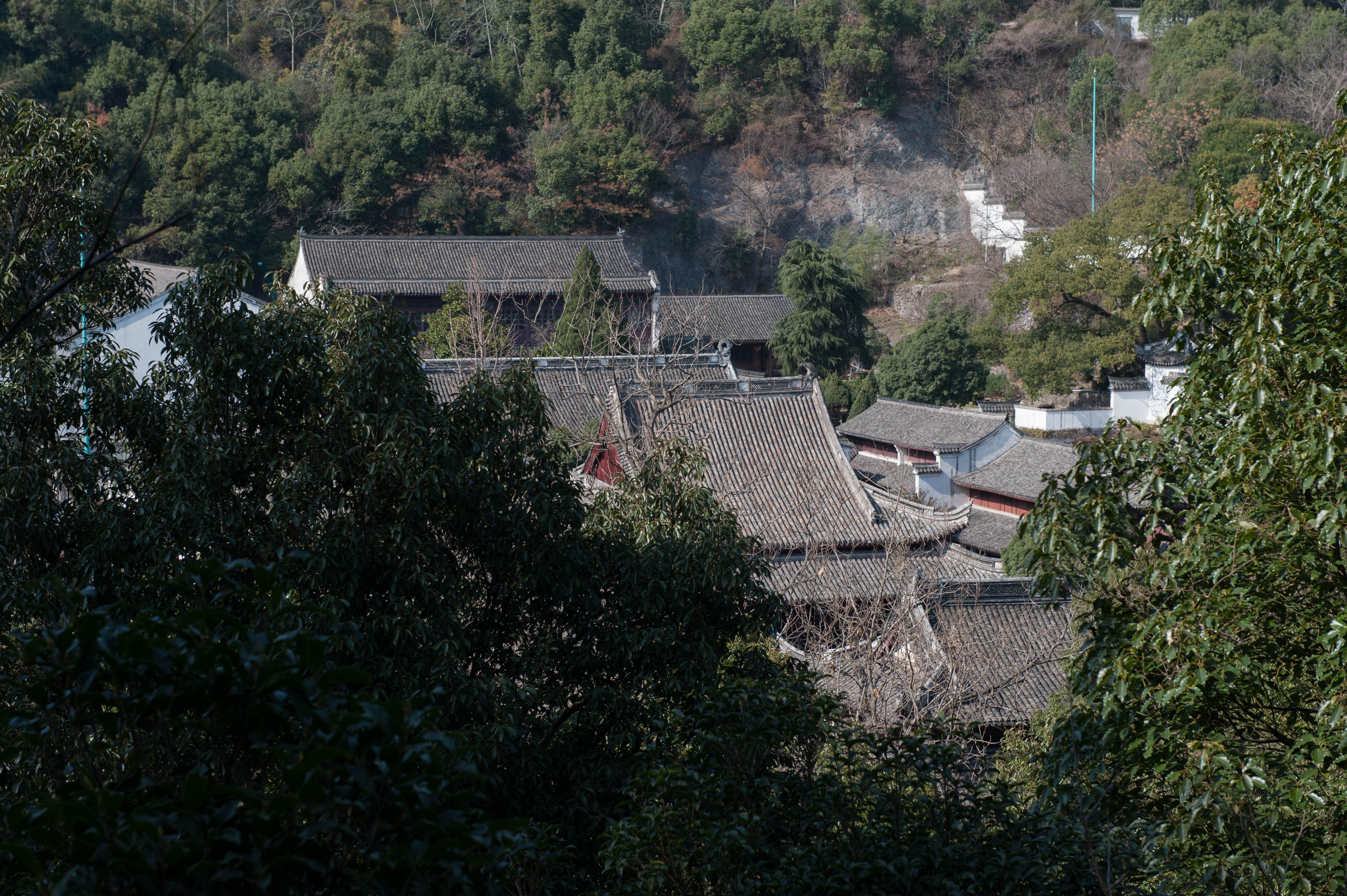 宁波保国寺